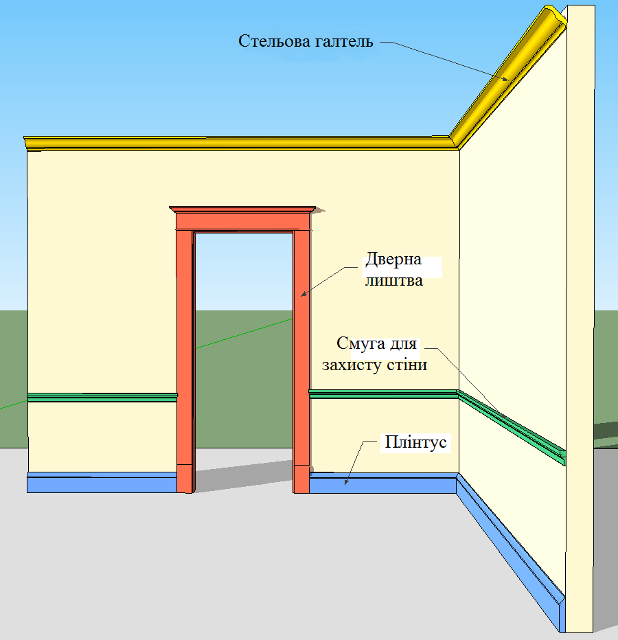 Види профілів для оформлення інтер'єру (на основі файла Interior Moldings.png)